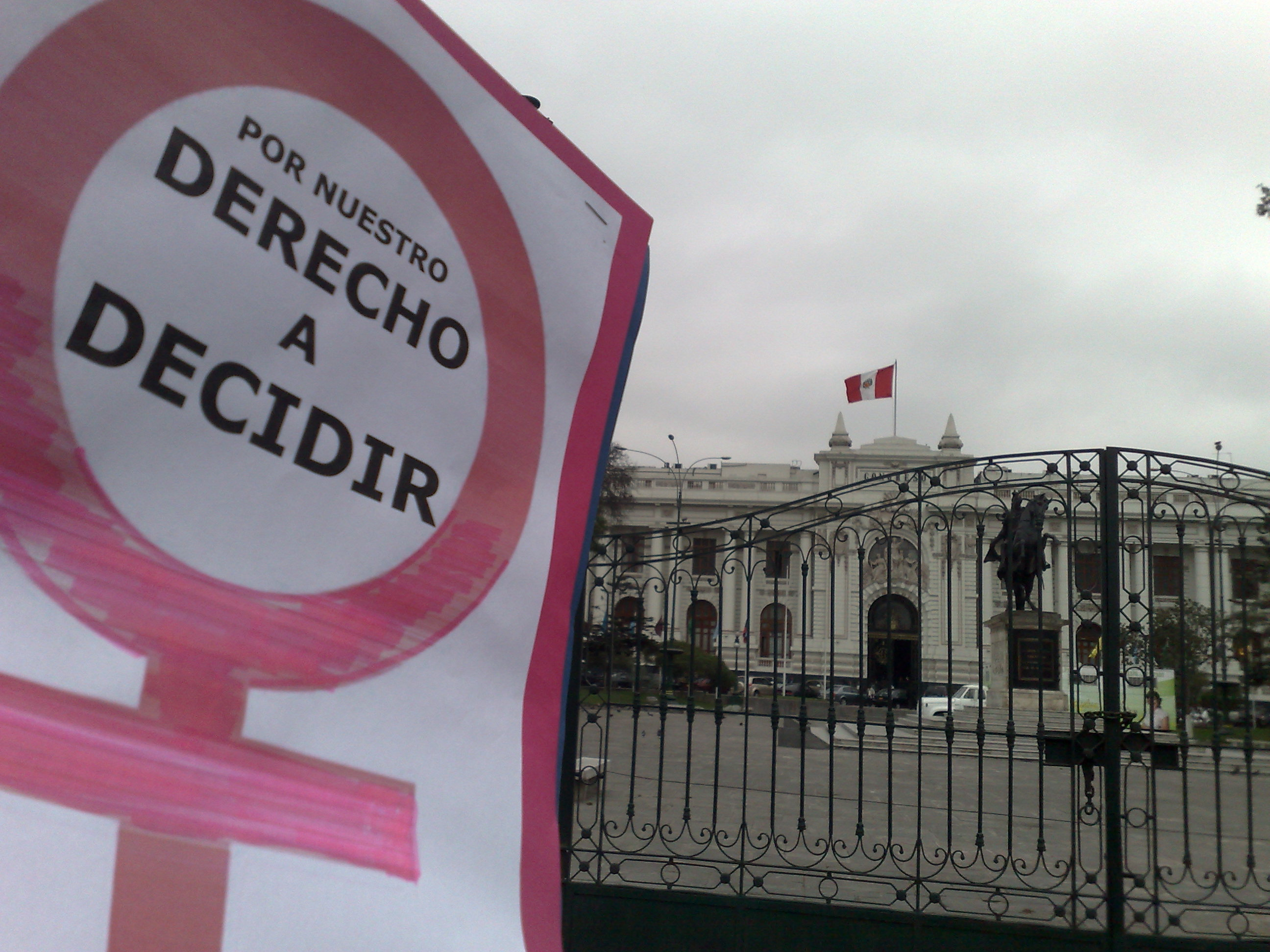 Marchamos por el derecho de toda mujer a elegir lo mejor para su vida y su cuerpo. (Lima)